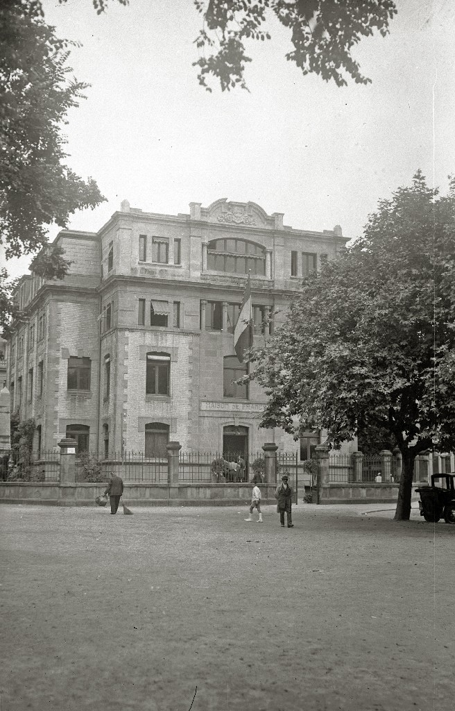 Título original: Edificio de la Escuela Francesa (1/1) Localización: San Sebastián (Guipúzcoa)